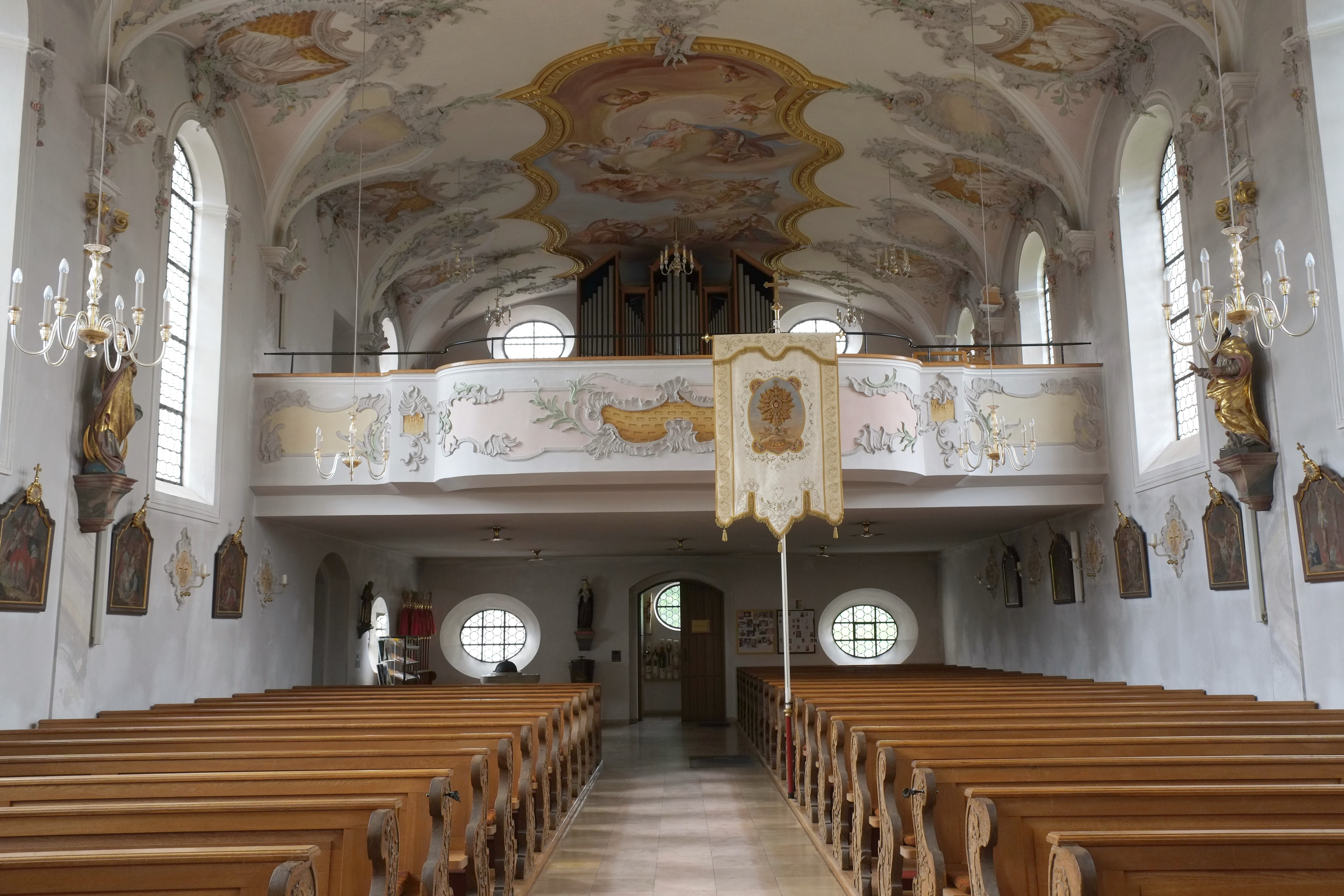 katholische Pfarrkirche St. Michael in Fischach im Landkreis Augsburg (Bayern)